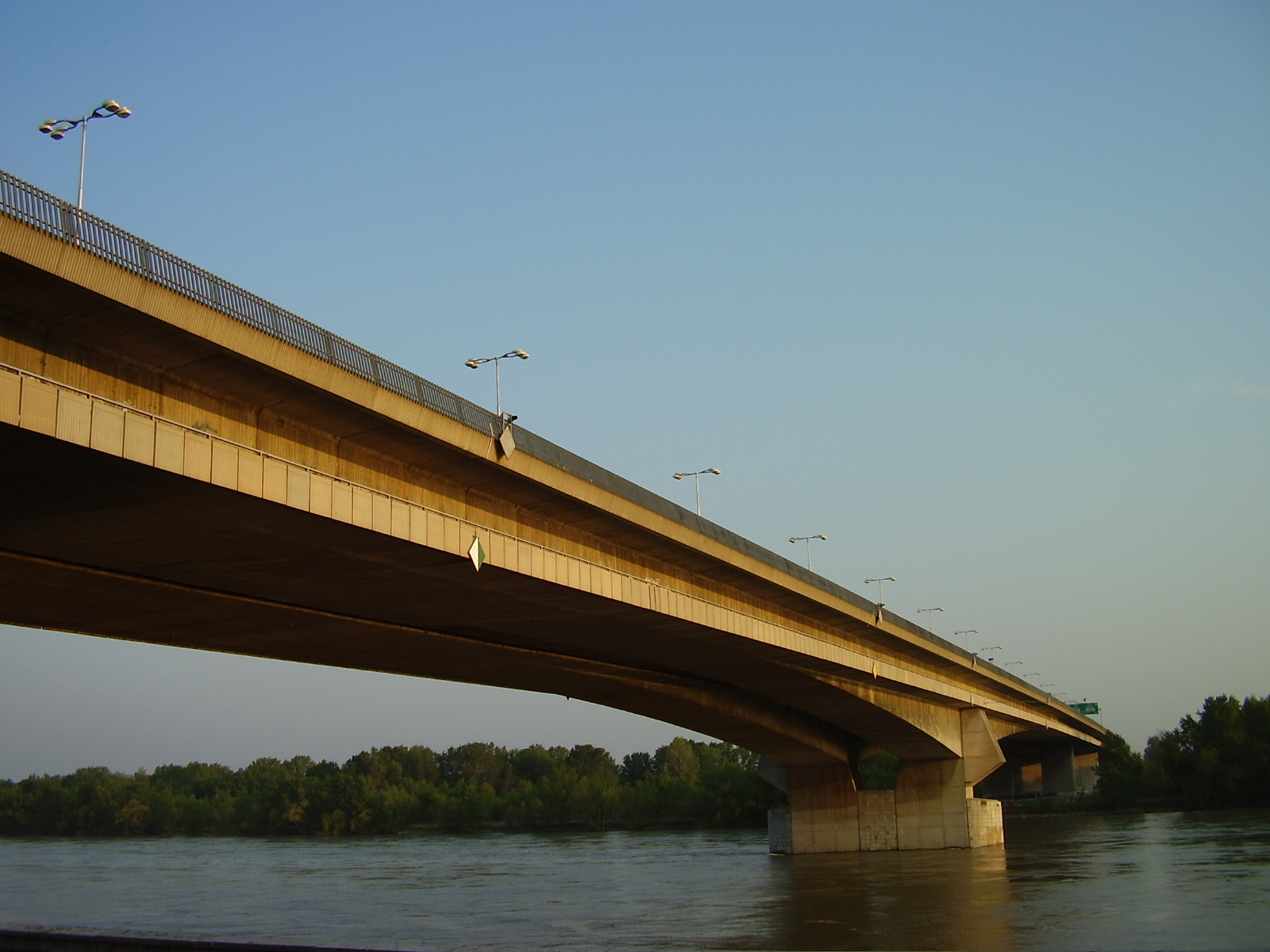 Most Lafranconi